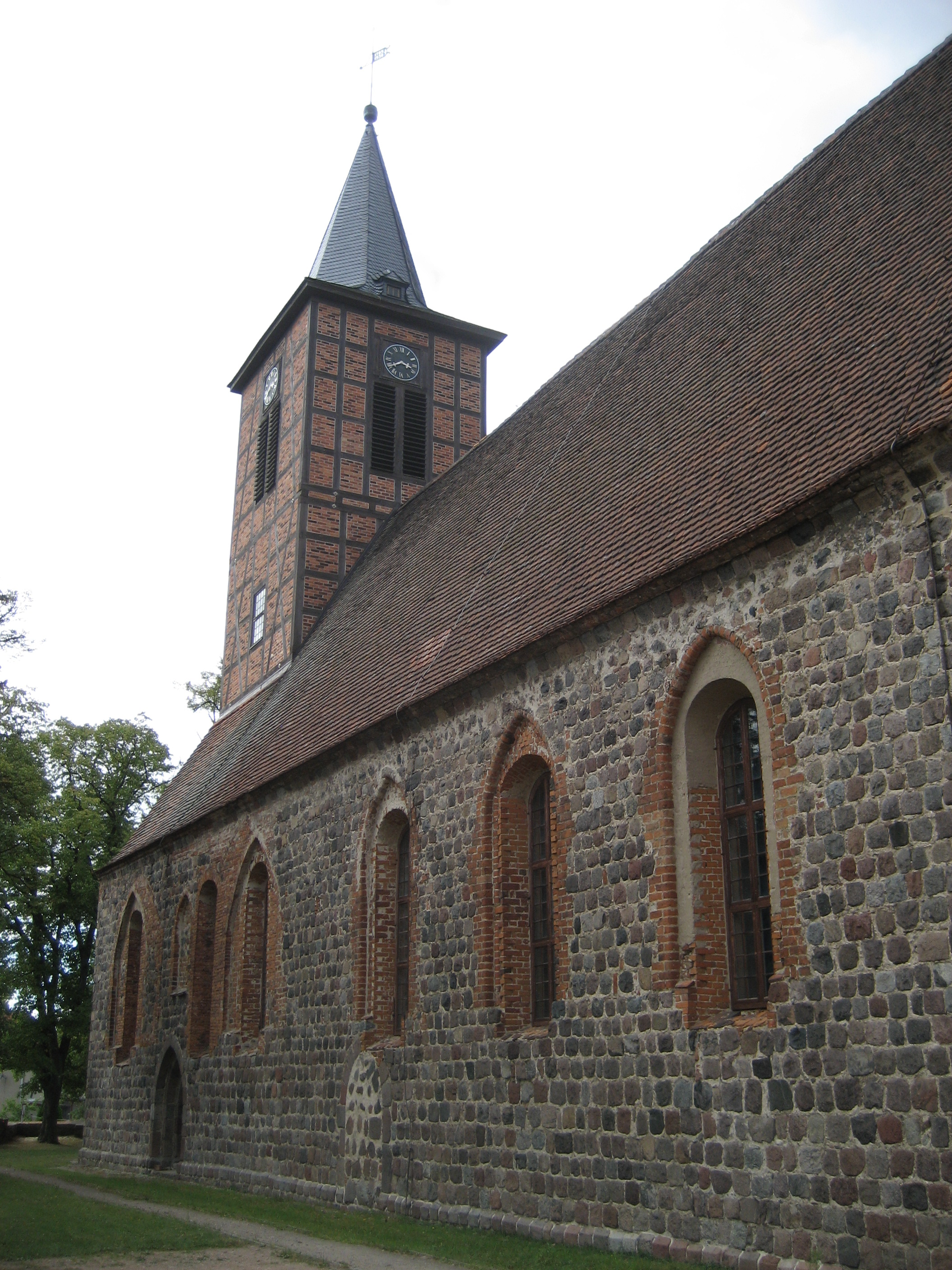 Die Kirche St. Sophia in Brüssow.